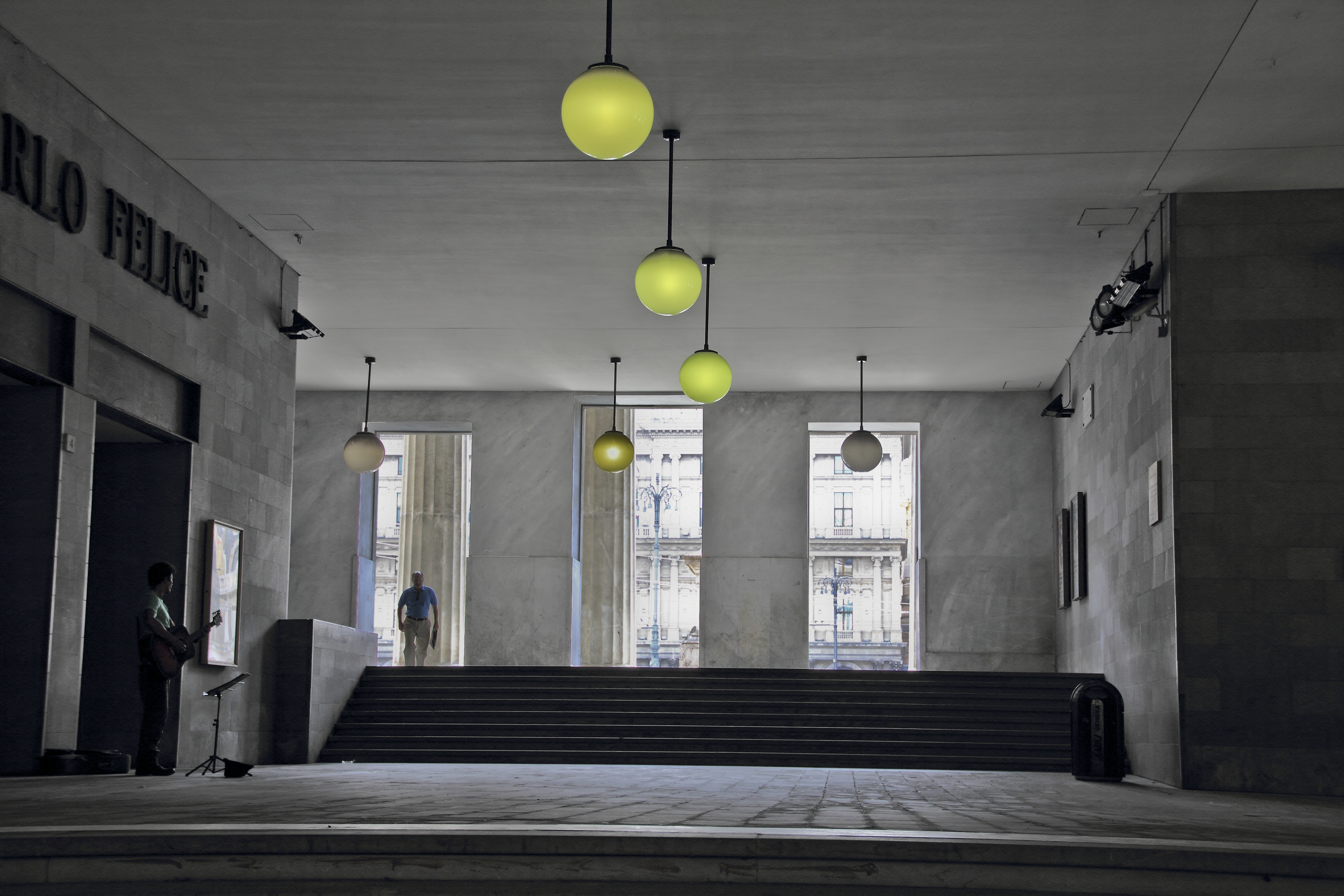 Teatro Carlo Felice This is a photo of a monument which is part of cultural heritage of Italy.